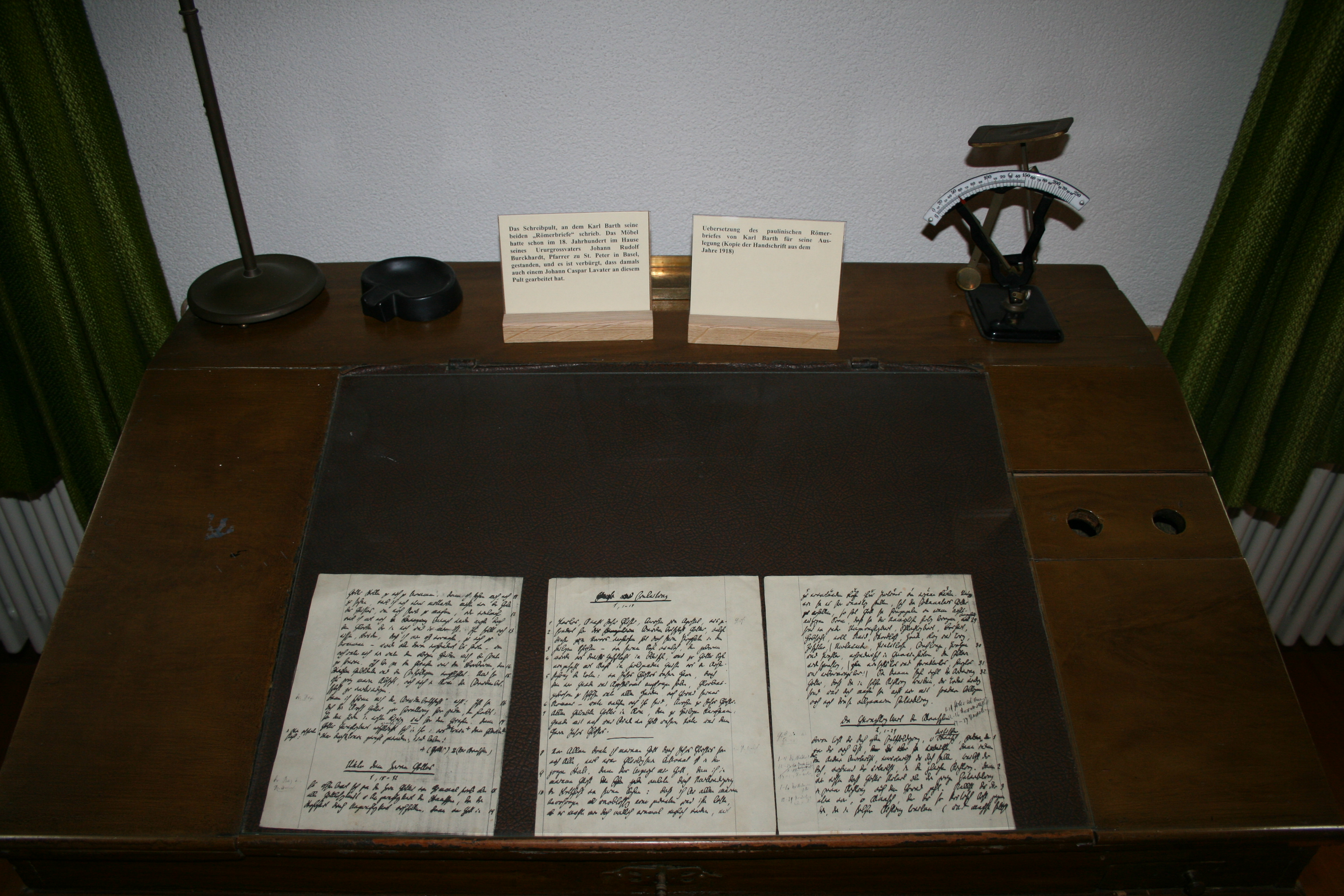 Karl-Barth-Stube in Safenwil AG